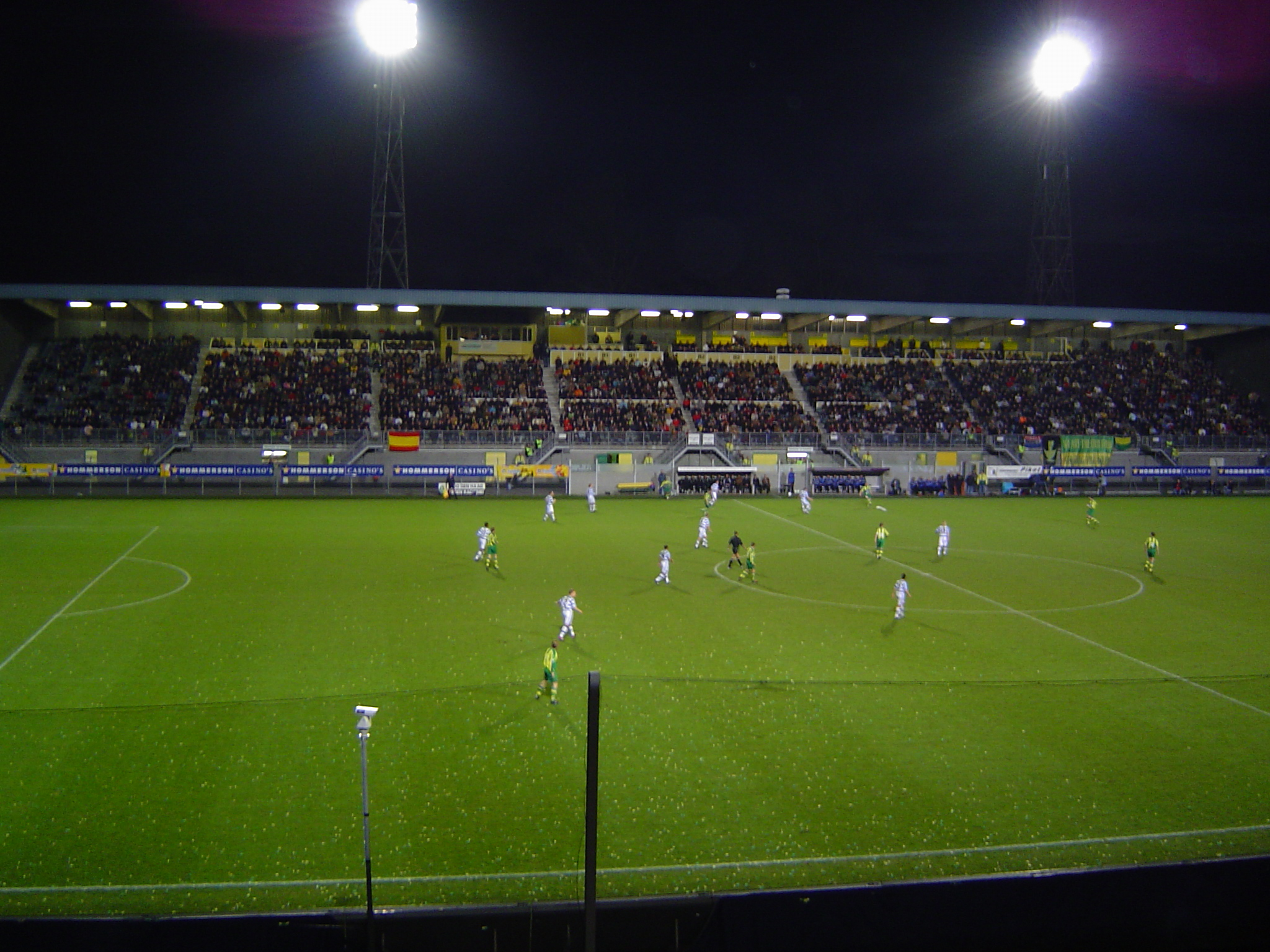 Estadio Zuiderpark de ADO Den Haag Zuiderpark stadium of ADO Den Haag. View on the south stage. Made by Joris van Rooden on 26-03-2004